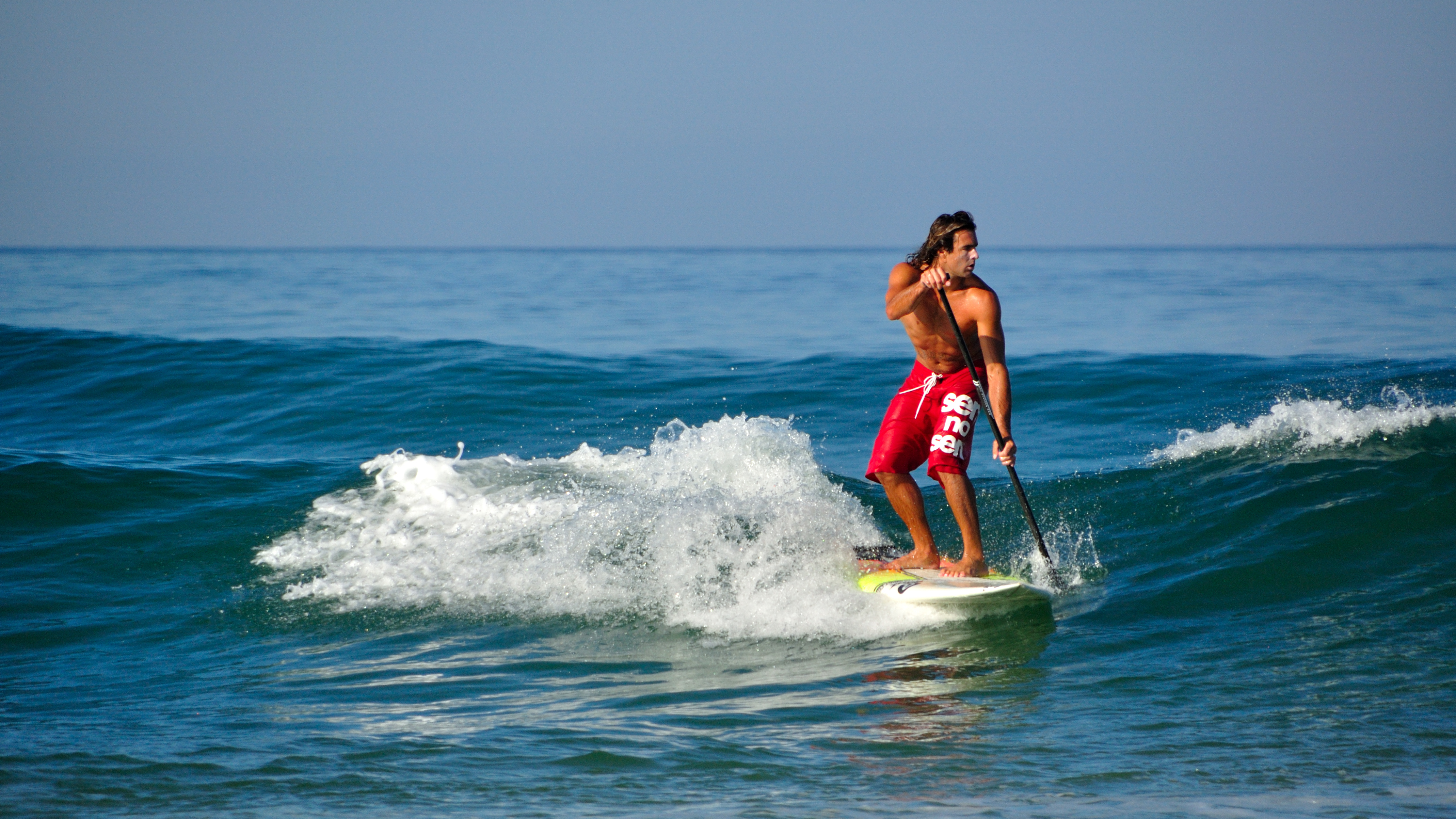 Jérémy Massière (champion de france de SUP 2009) surfant sur la plage de Biscarrosse en septembre 2012